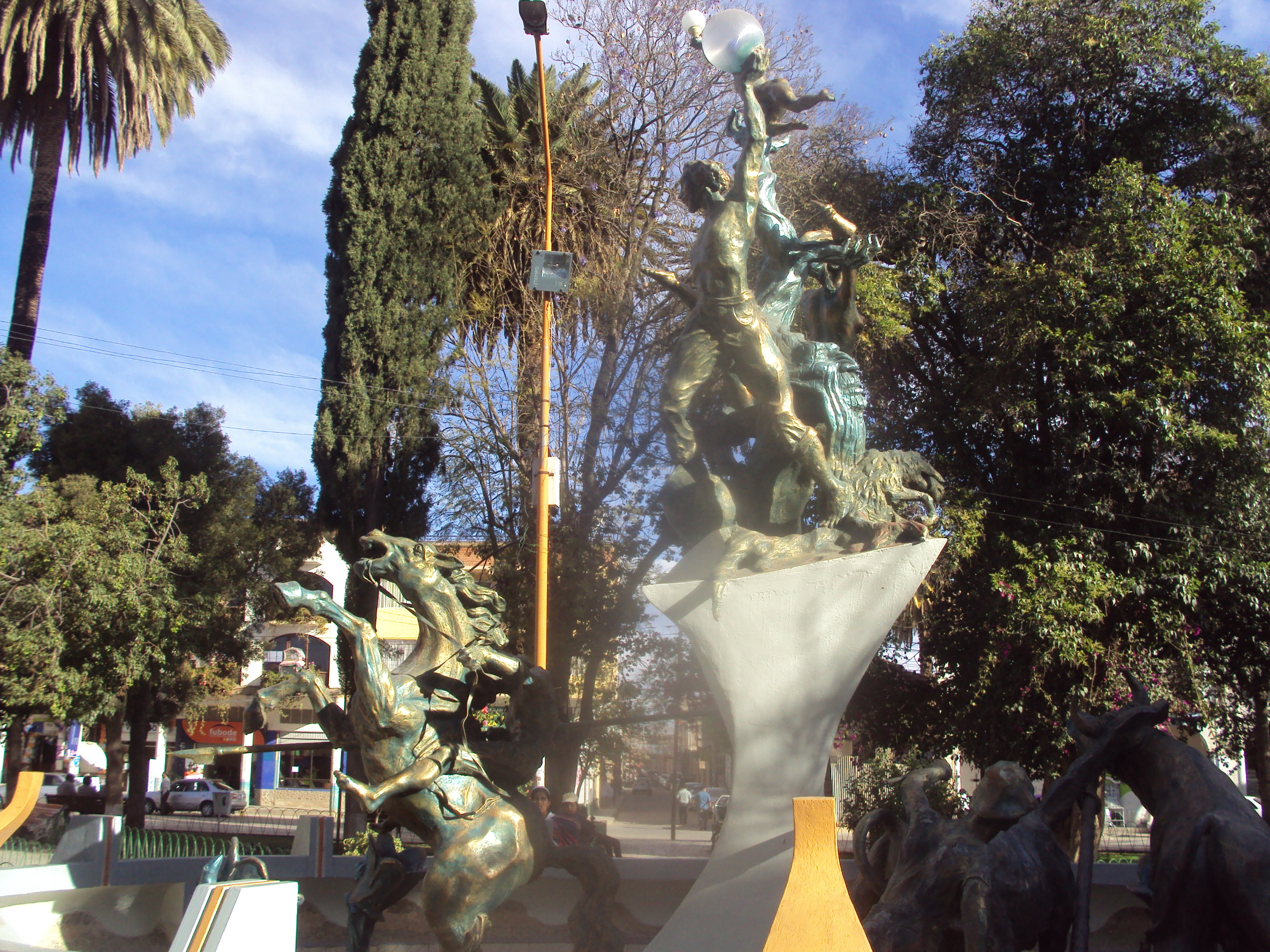 Cliza conocido el granadero de Bolivia, lugares historicos que usted puede conocer que de mucha importancia